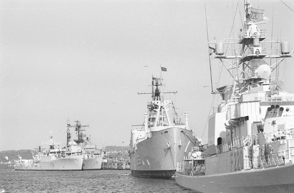 Im Vordergrund Fregatte KÖLN (F 220), dahinter Schulschiff CUSTÓDIO DE MELLO (brasil., U 26). Im Hintergrund Fregatte MURRAY (brit., F 91) und Fregatte CARYSFORT (brit., R 25).